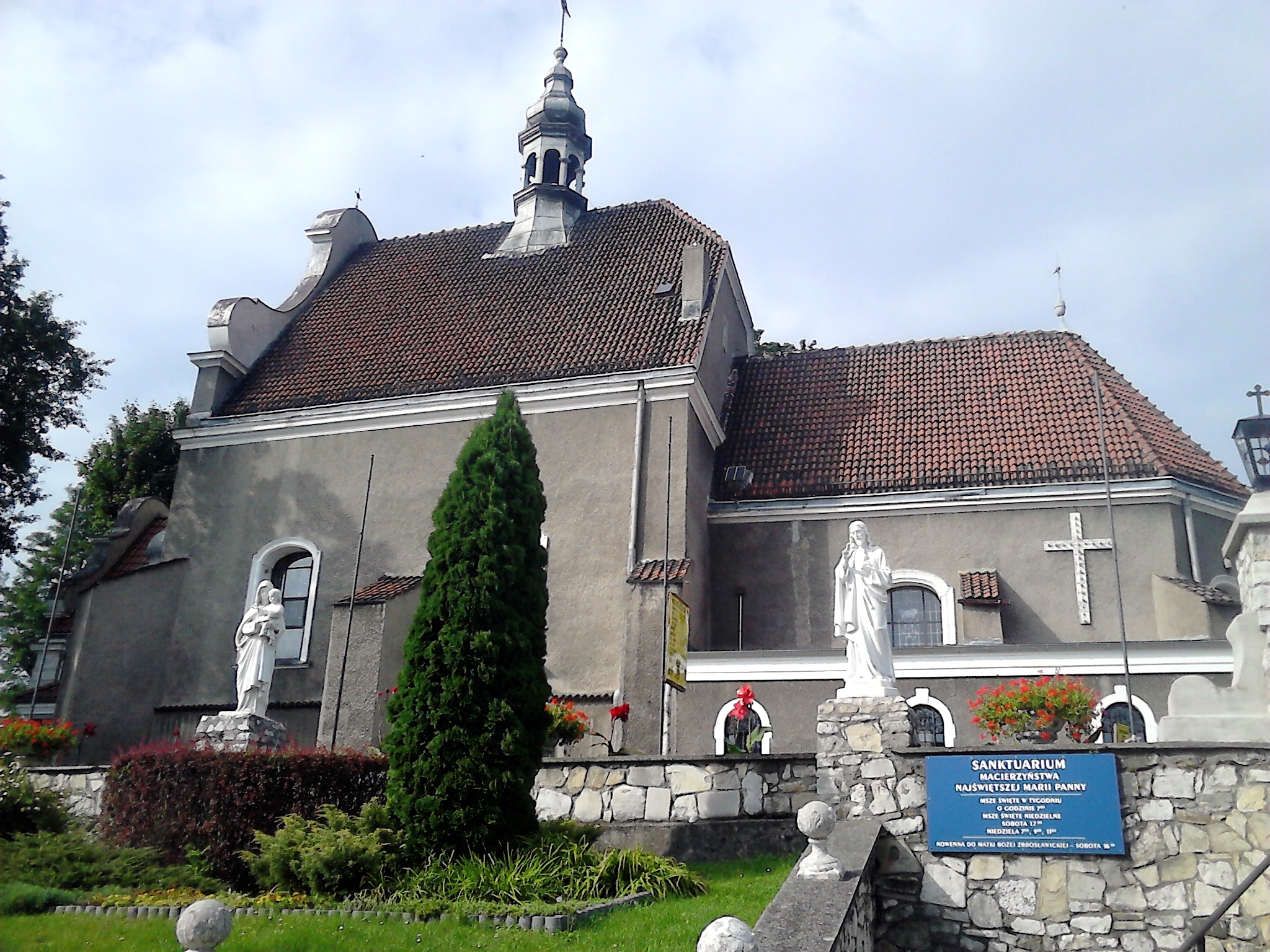 Zbrosławice, kościół pw. Wniebowzięcia NMP, 1 poł. XV, 1 ćw. XVII w., 1774-1777